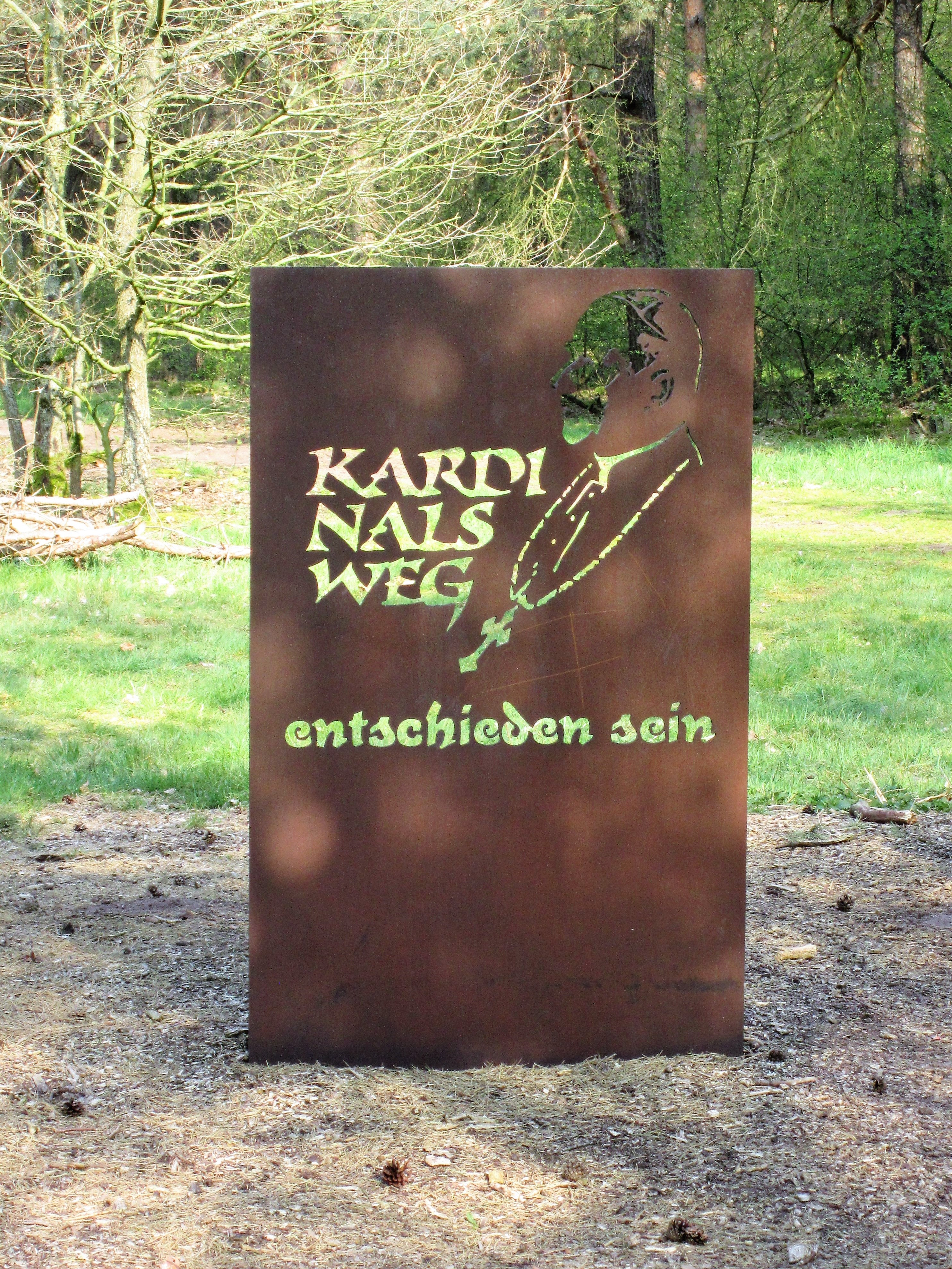 Stele "entschieden sein" bei Middendorfs Kreuz am Kardinalsweg, des Kardinalswegs, eines Pilgerwegs von Damme nach Dinklage im niedersächsischen Landkreis Vechta. Die Stele befindet sich 300 m südlich des Eingangs zum Heidesee Holdorf.